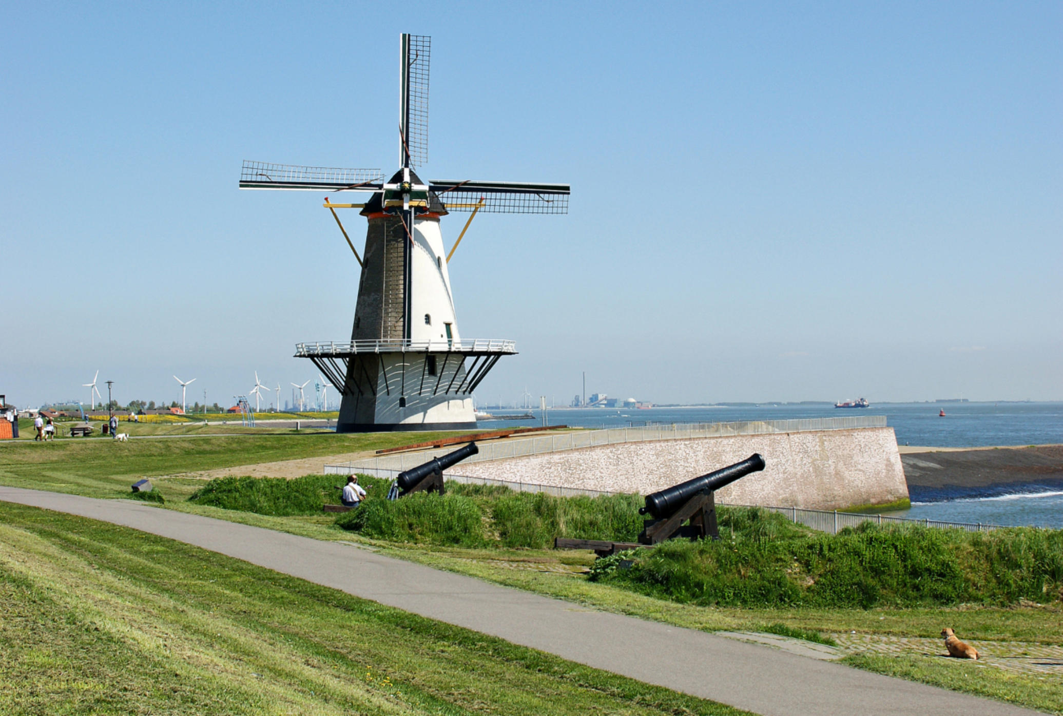 Oranjemolen op de Oranjedijk